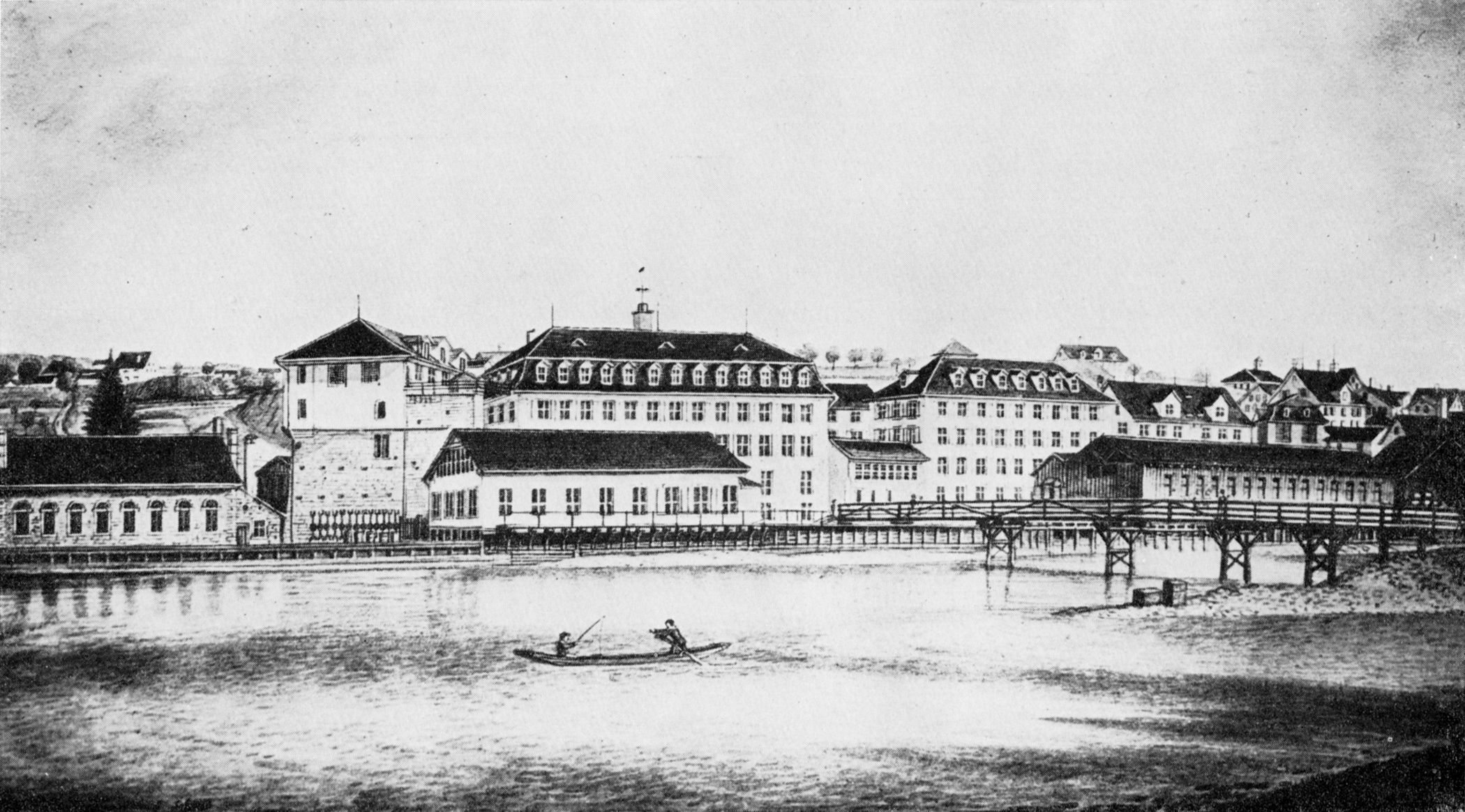 Die Fabrikanlagen der Firma Escher-Wyss in Zürich am Neumühlequai im 19. Jahrhundert vor dem Umzug der Firma nach Aussersihl 1889